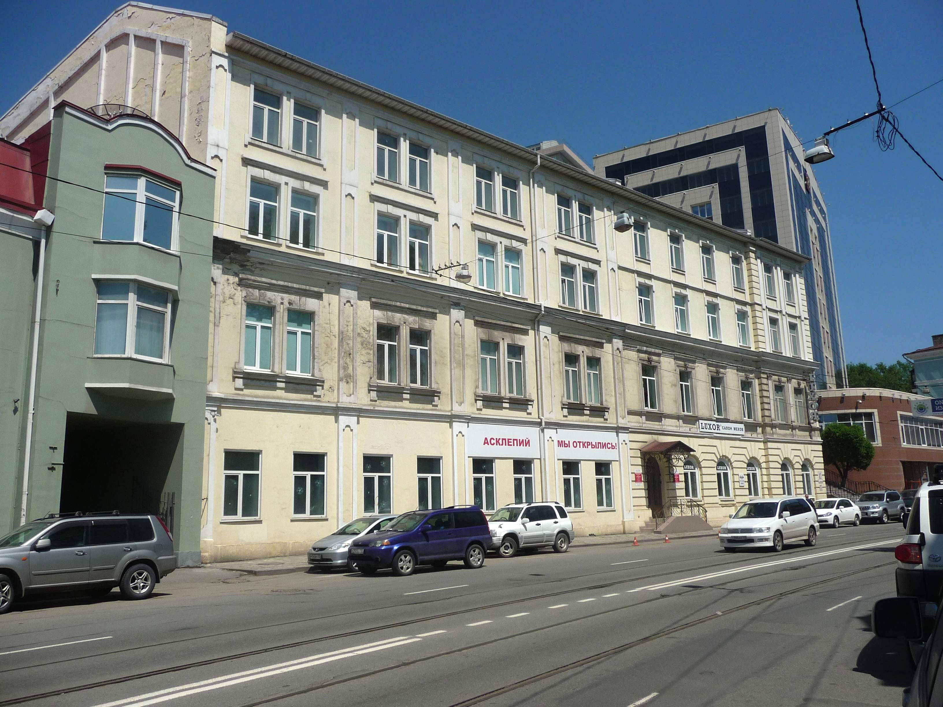 Владивосток, ул. Светланская, 113, 2012-07-05